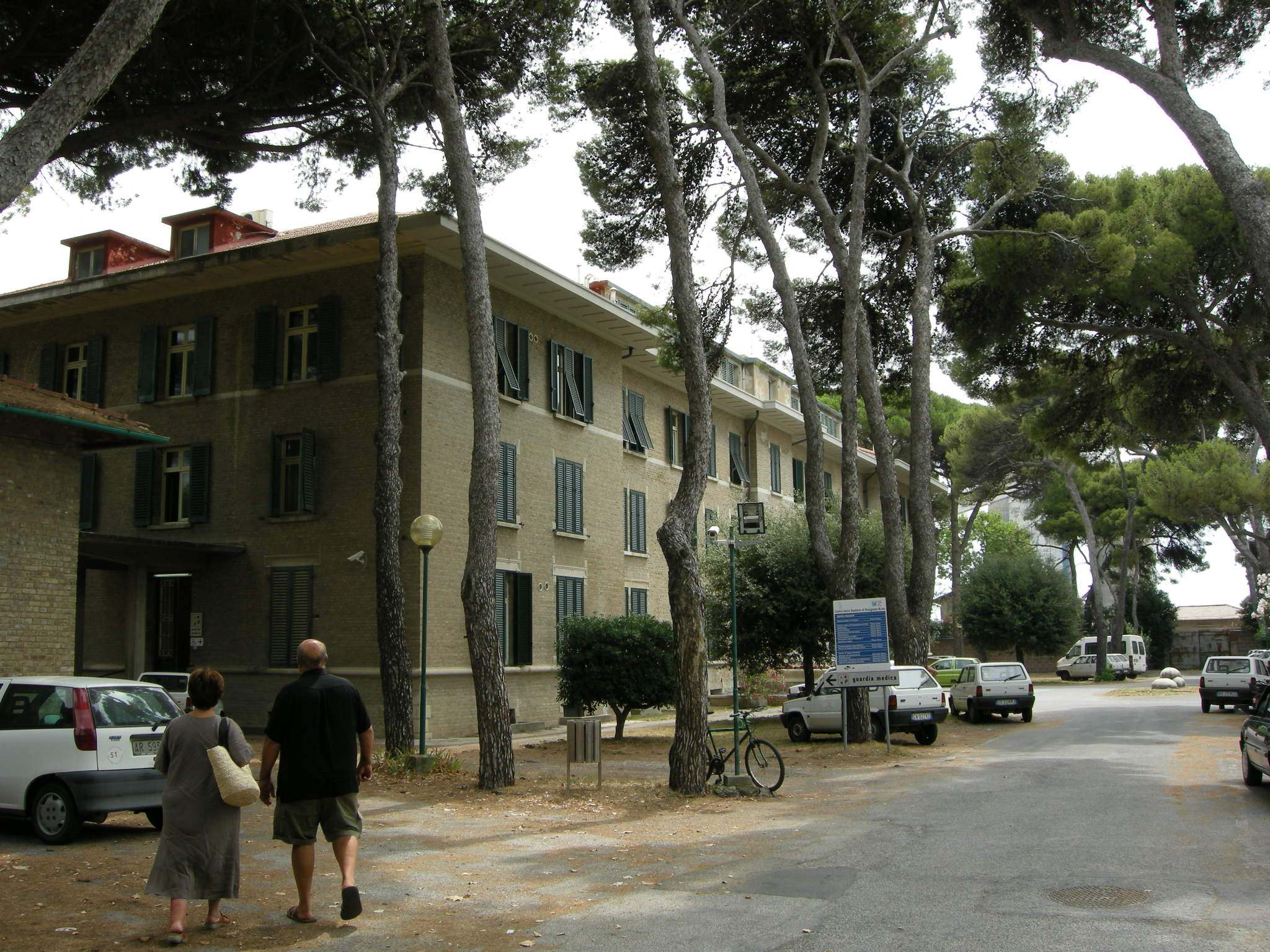 Villaggio solvay, servizi, ospedale